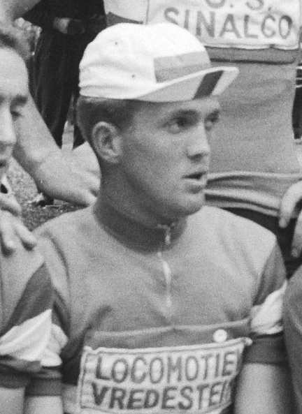 Nationaal Archief Beschrijving: De Nederlandse ploeg, Tour de France 1960 Coen Niesten Datum: 28 juni 1960 Bestanddeelnummer 911-3748 Vervaardiger: Anefo / Harry Pot (1929–1996) DescriptionDutch photographer and cinematographerDate of birth/death 1929 1996Work location Amsterdam, BentveldAuthority control : Q27877051 VIAF: 284191334 ISNI: 0000 0003 9050 874X Koninklijke: 073478326 creator QS:P170,Q27877051 URL: Voor meer informatie over het Nationaal Archief: Voor meer foto's uit deze en andere collecties, bezoek onze Beeldbank:, U kunt ons helpen onze kennis van de fotocollecties te verrijken door tags en commentaren toe te voegen. Herkent u mensen of locaties of heeft u een bijzonder verhaal te vertellen bij één van de foto's, laat dan een reactie achter (als u ingelogd bent bij Flickr) of stuur een mailtje naar